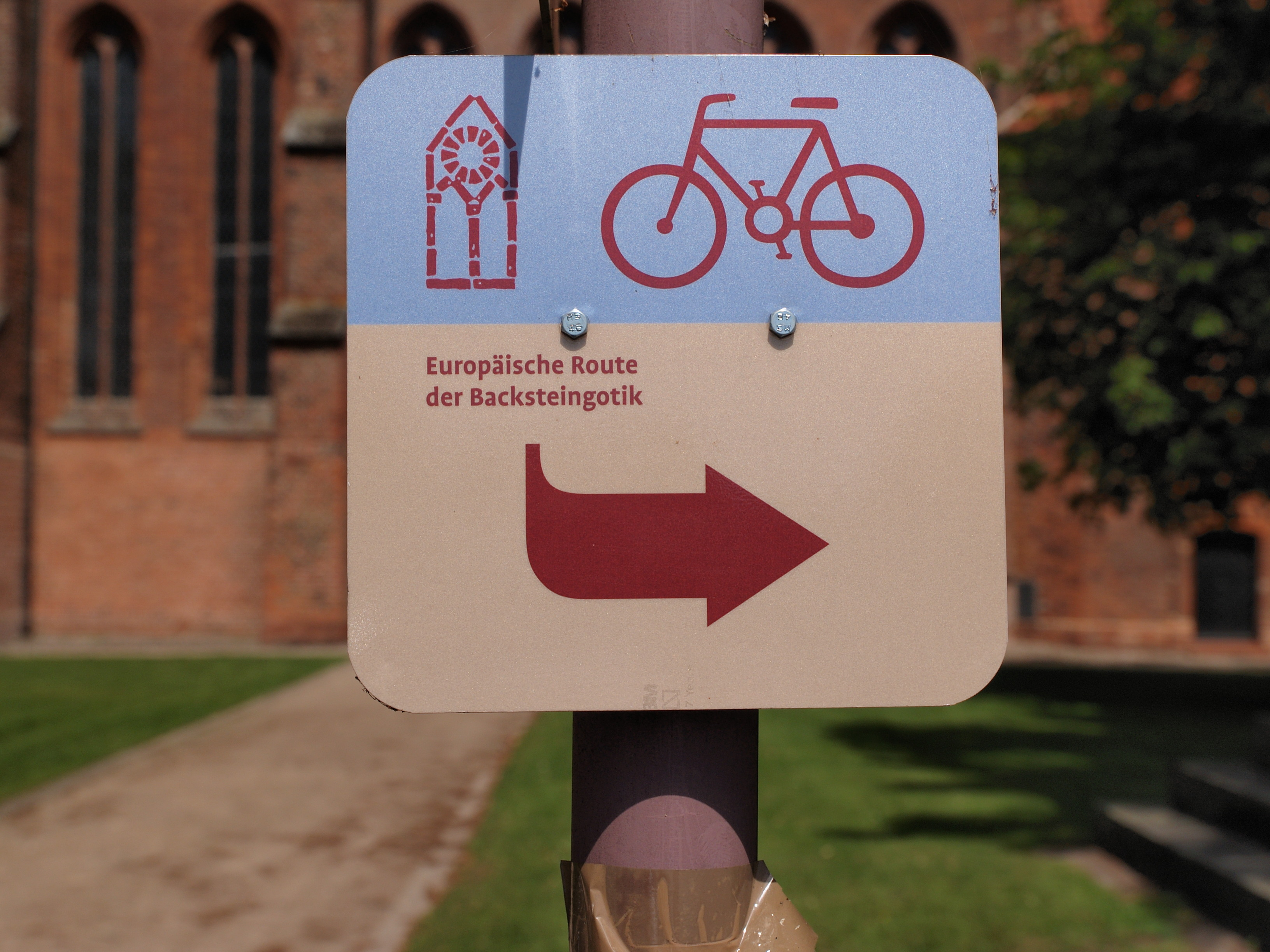 Hinweisschild für die Route der Backsteingotik in Norddeutschland